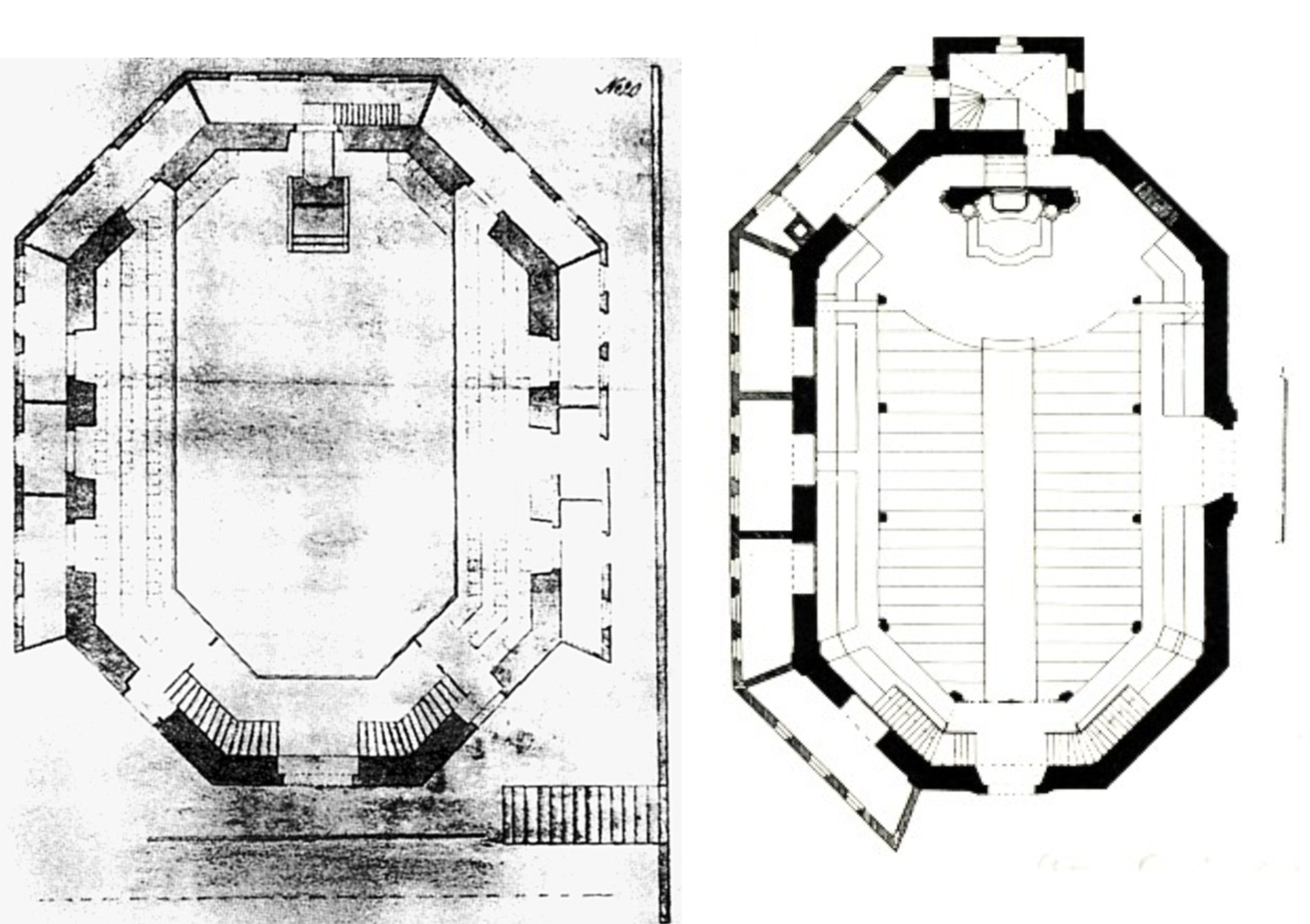 Grundrissgegenüberstellung der Loschwitzer Kirche. Links ein Entwurf (von George Bähr?) um 1704, der nicht verwirklicht wurde, rechts ein Grundriss der verwirklichten Kirche, mglw. von Cornelius Gurlitt gezeichnet. Entwurf links aus Möllering: George Bähr (1933), Skizze recht aus Cornelius Gurlitt: Beschreibende Darstellung der älteren Bau- und Kunstdenkmäler des Königreichs Sachsen, Band 26 (1904), beide Skizzen von mir zwecks Vergleich nebeneinandergestellt.